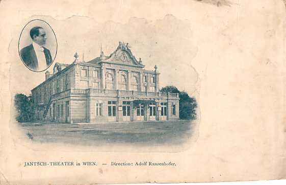 Das Jantsch Theater zwischen 1898 und 1905 (Umbenennung in "Lustspieltheater") in Wien.